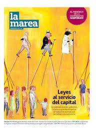 Portada del nº1 del periódico español La Marea, de enero de 2013.